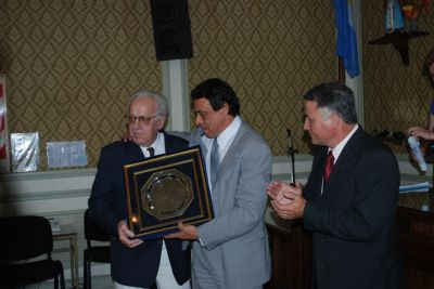 Reconocimiento al ex intendente de Zárate Aldo Arrighi (1983-1995) en el 25º aniversario del retorno de la democracia. Aldo Arrighi, Osvaldo Cáffaro, Manuel García Blanco